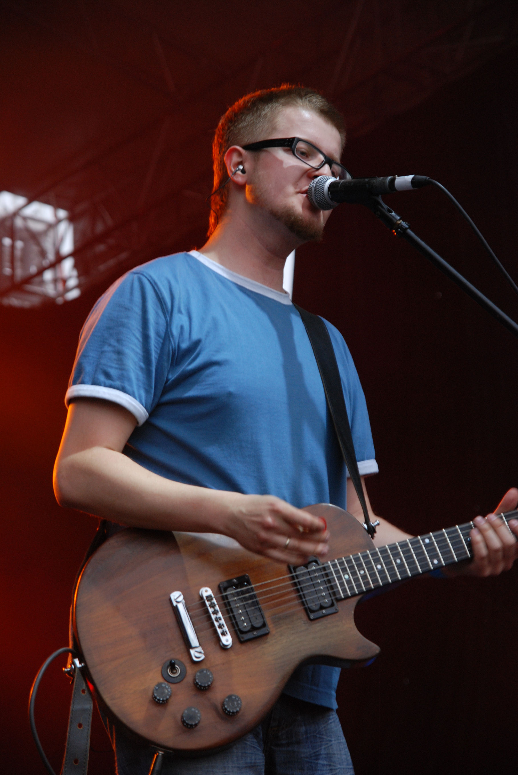 Piotr Wrobel podczas koncertu plenerowego na Lotnisku Muchowiec w Katowicach. Juwenalia Śląskie 17.05.2008r .